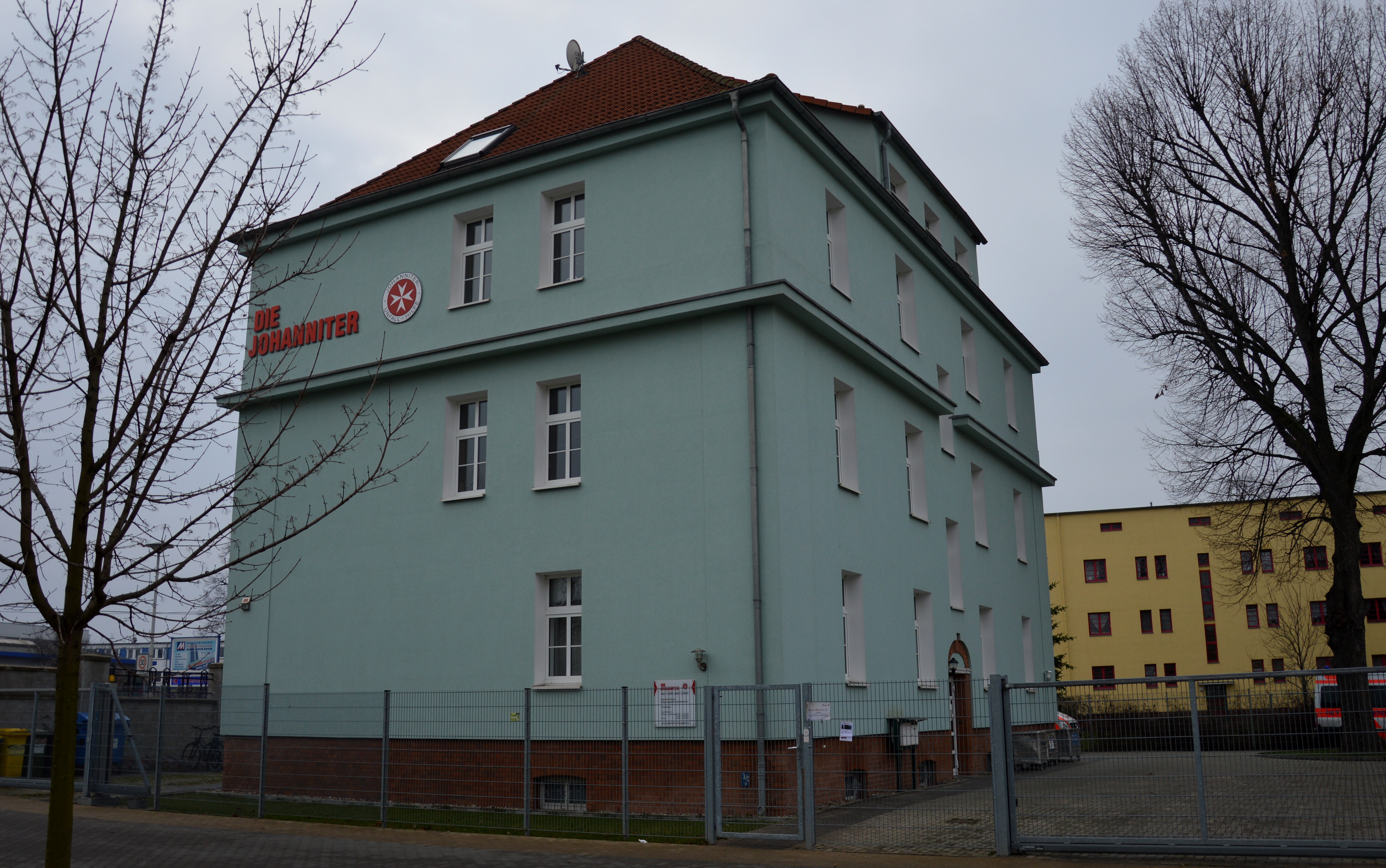 Encke-Kaserne Gebäude an der Einfahrt